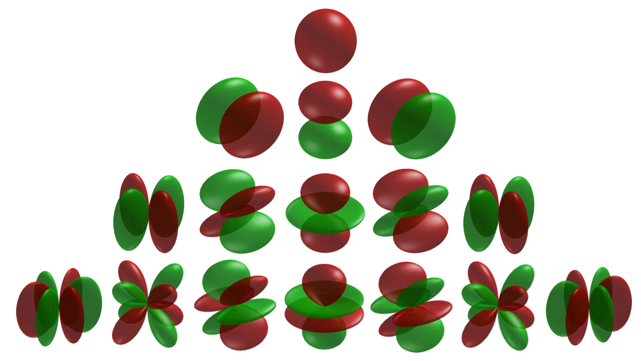 Harmoniki sferyczne dla parametrów L=0..3 oraz M=-L..L